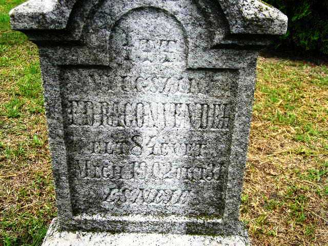 A kiskunmajsai újtemetőben készült sírfotó. Feirata: ITT NYUGSZIK F.DRAGON VENDEL ÉLT 84 ÉVET MEGH: 1902.okt.31. ÉS NEJE A kép illusztráció lesz a Wikipédia Családfakutatás szócikkhez.